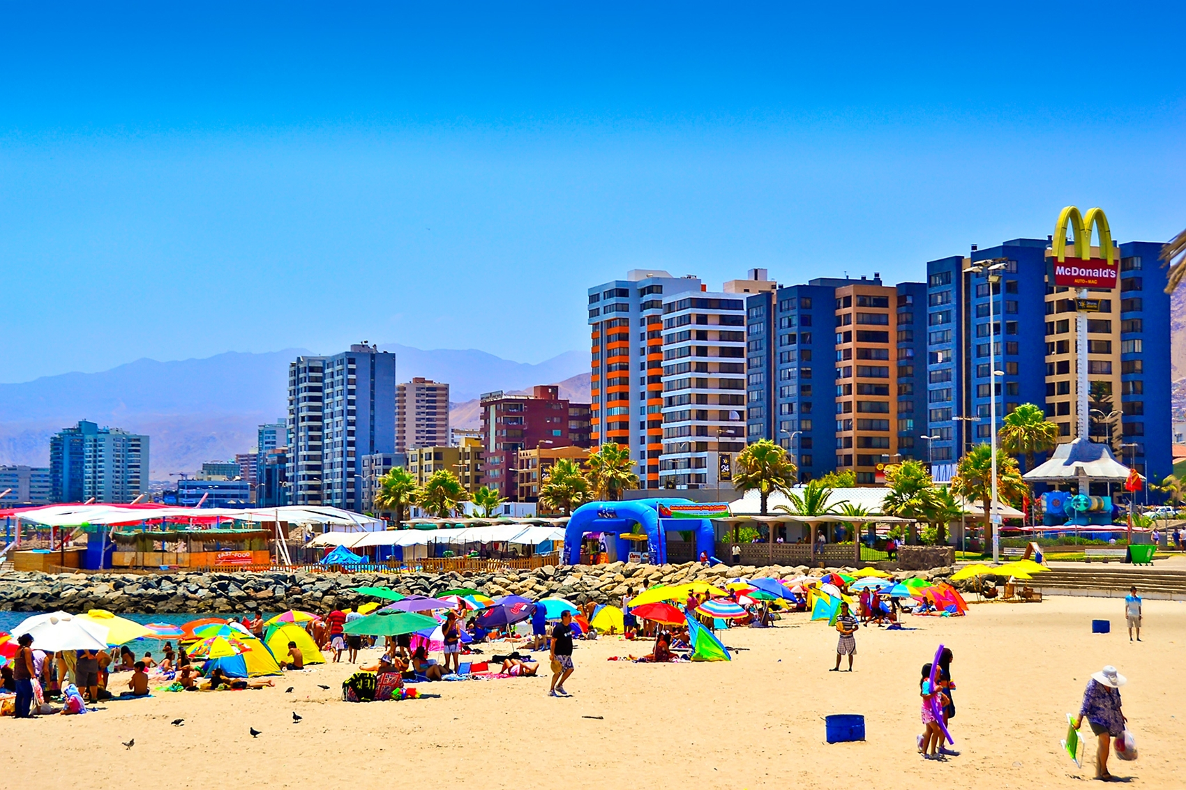 Balneario de Antofagasta